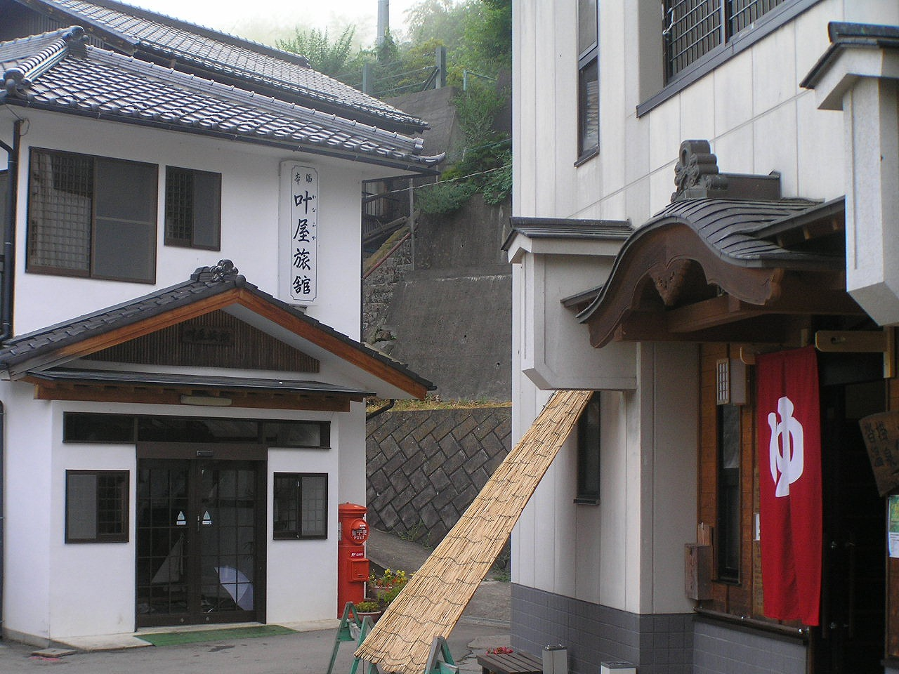 kutsukake-onsen沓掛温泉